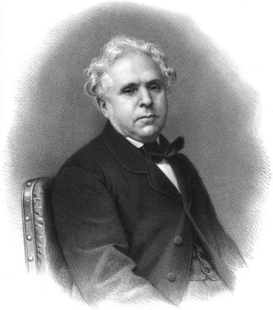 Marie-Roch-Louis Reybaud